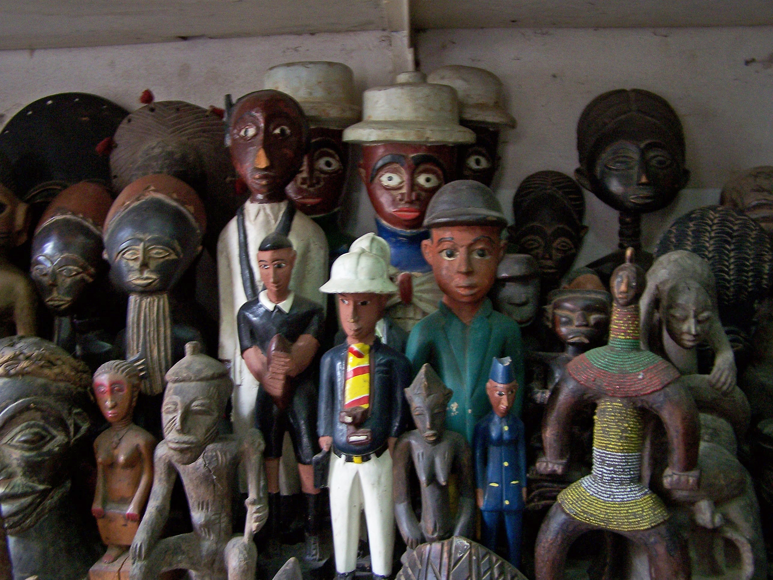 Musée de l'IFAN (Dakar, Sénégal). Statues of different kinds of people, including a tourist